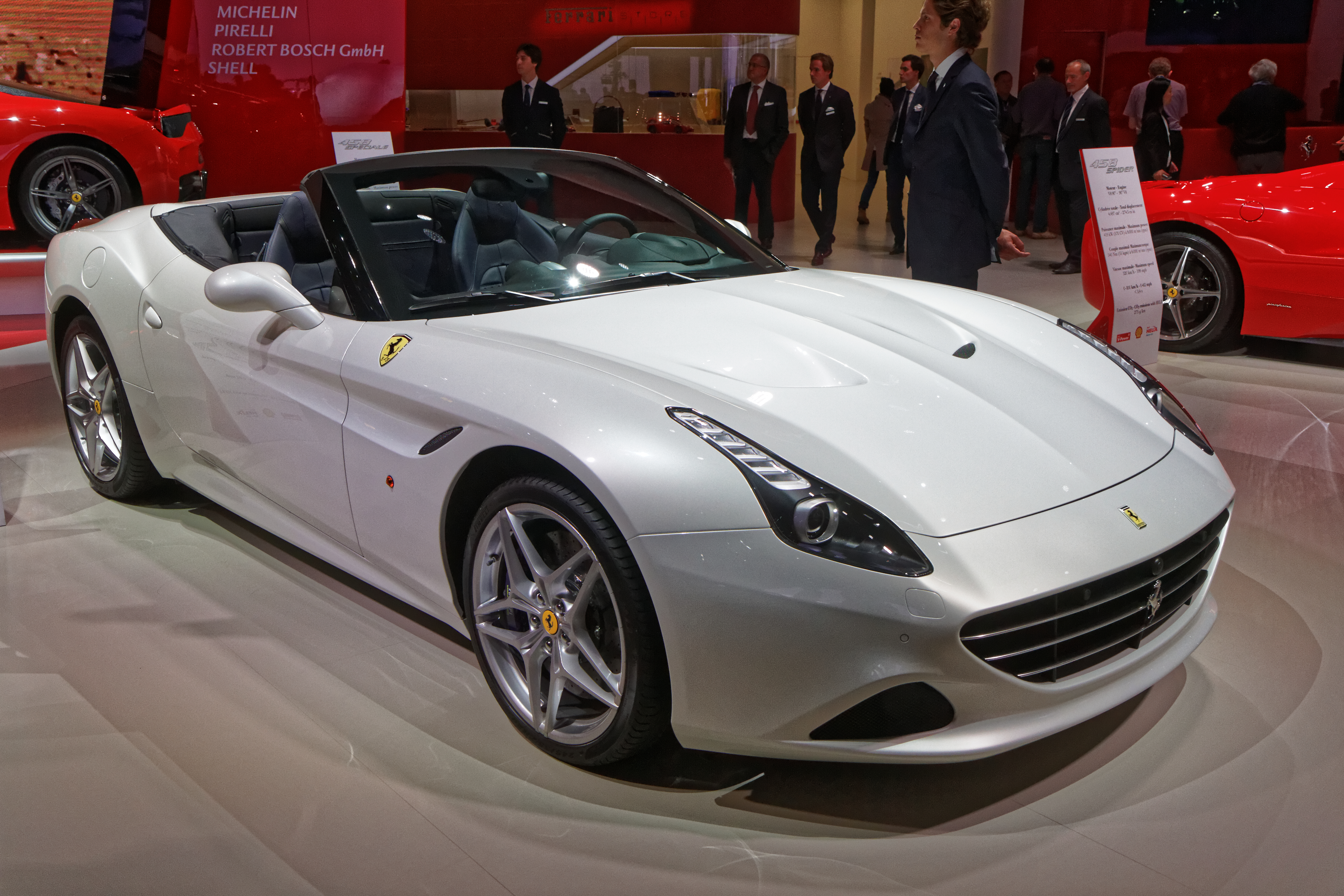 Une Ferrari California T présentée lors du mondial de l'automobile de Paris 2014.